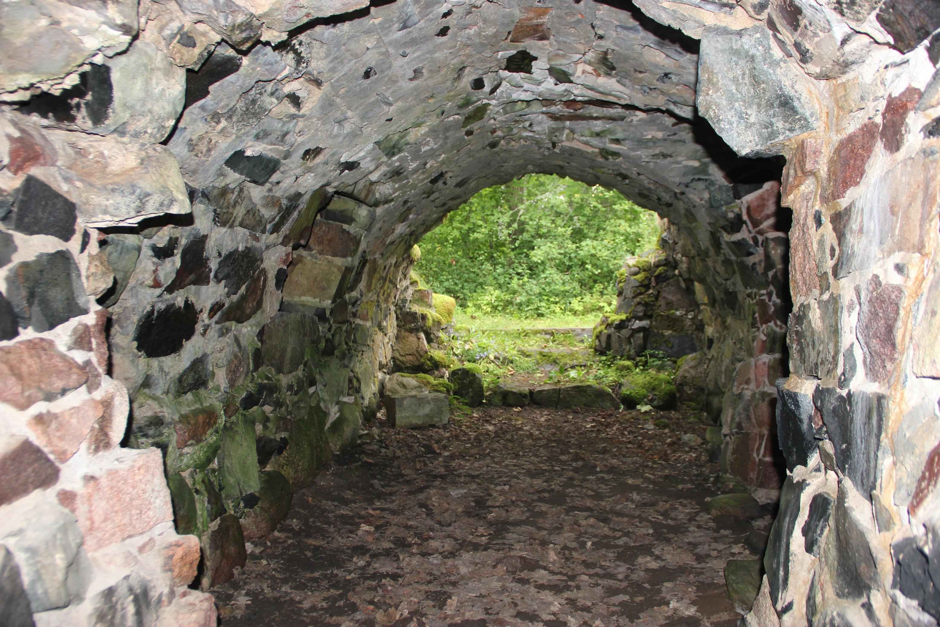 Kellarin sisäänkäyntiaukko, Haapaniemen linna, Kisko, Salo